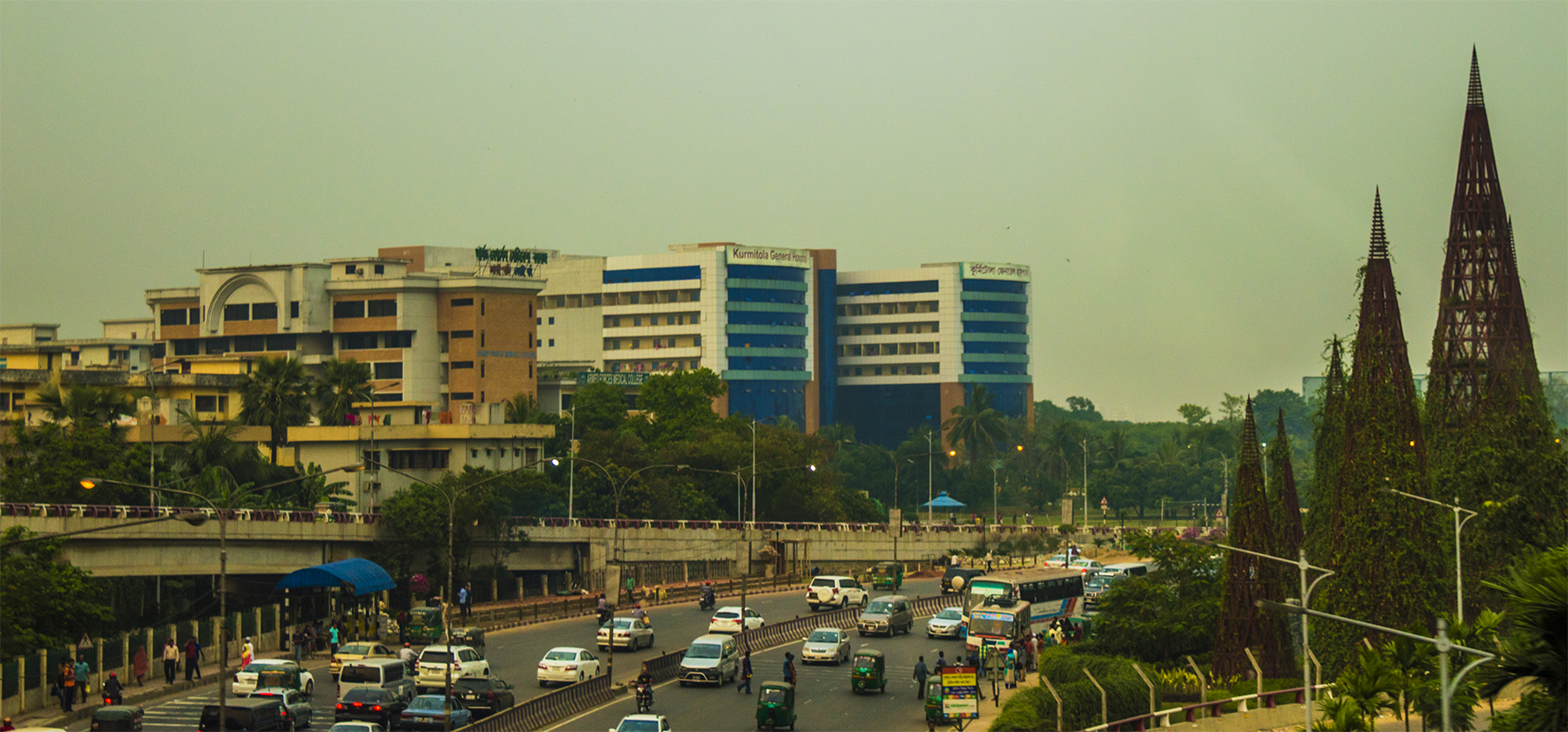 Dhaka